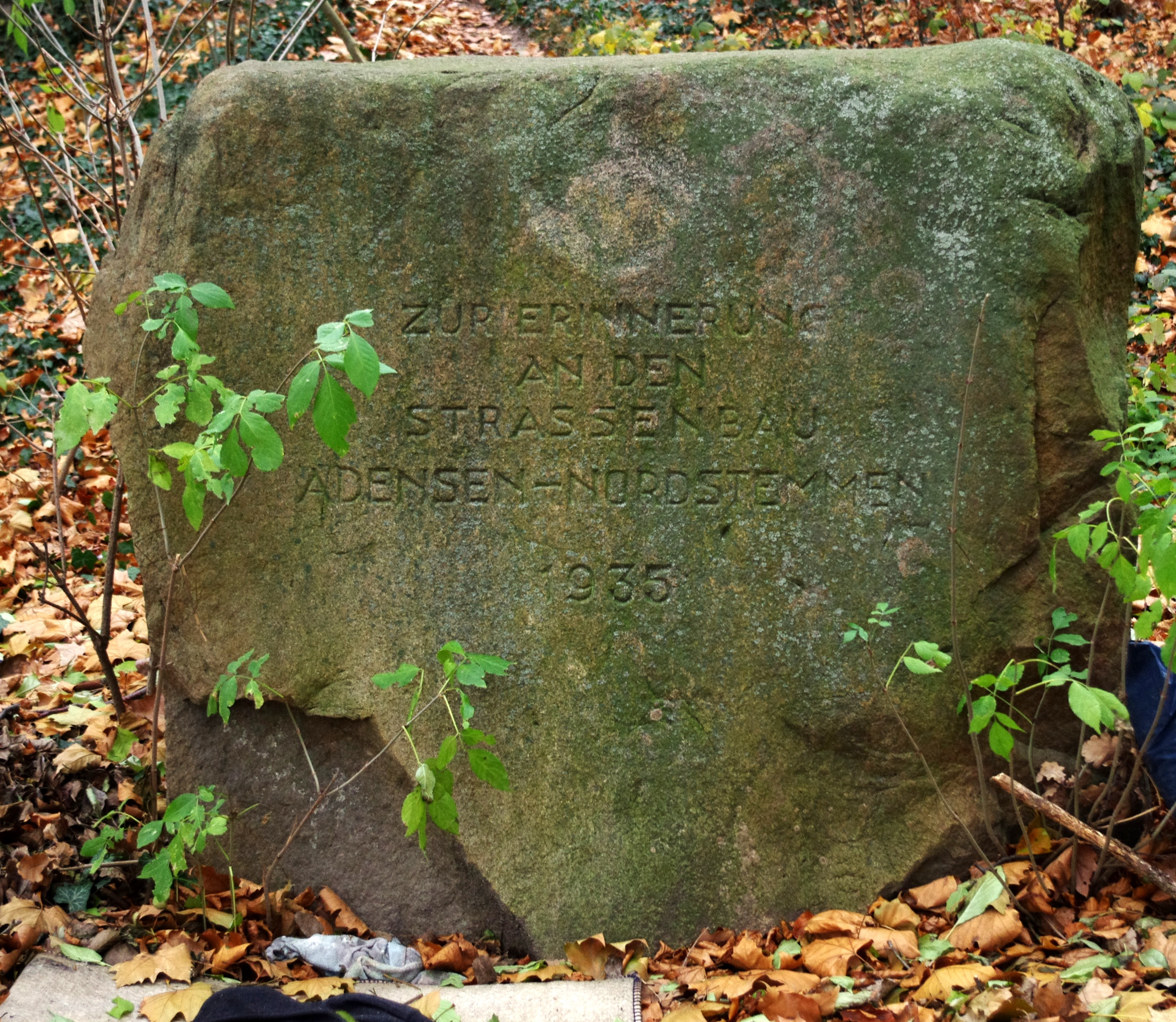 Pattensen Ortsteil Schulenburg in Niedersachsen. Der Gedenkstein befindet sich südlich der Mareinburg am Marienberg.